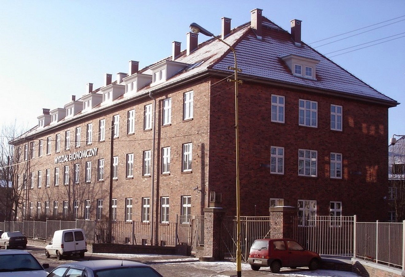 Dawne koszary w kompleksie przy ul, Mickiewicza w Szczecinie, obecnie Wydział Ekonomiczny Uniwersytetu Szczecińskiego: Brama jazdow Punktu Kontroli Technicznej (PKT)(Mieściło sie na Parterze)